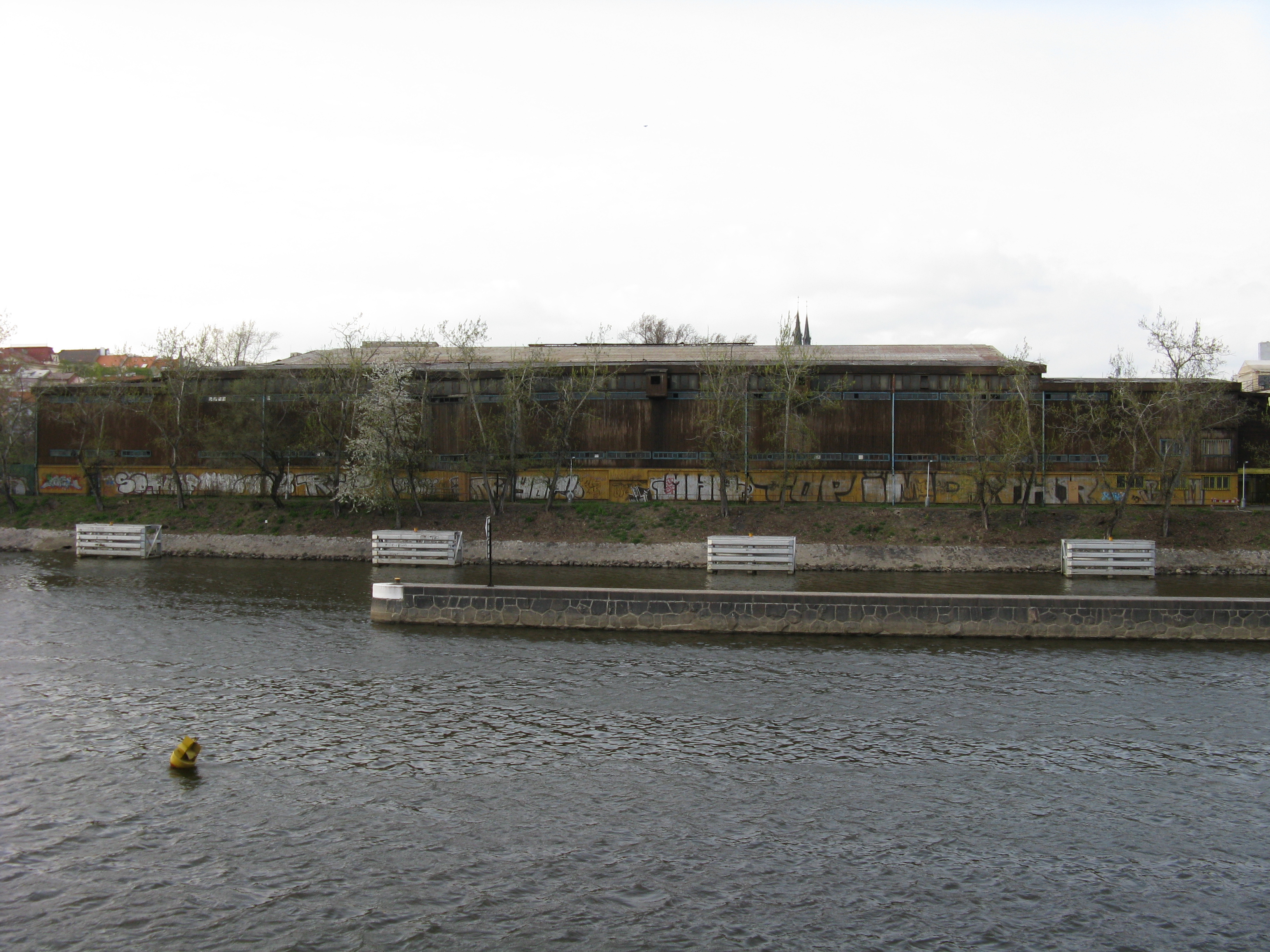 Zimní stadion na Štvanici, pohled na jižní stranu stadionu z nábřeží Ludvíka Svobody.